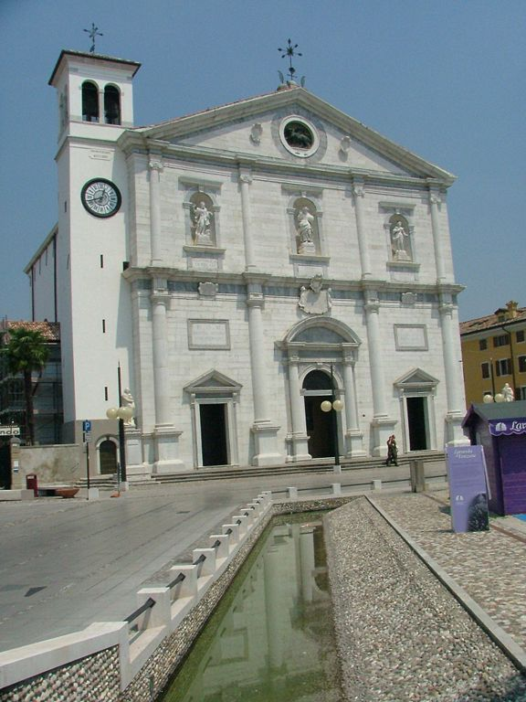 Palmanova